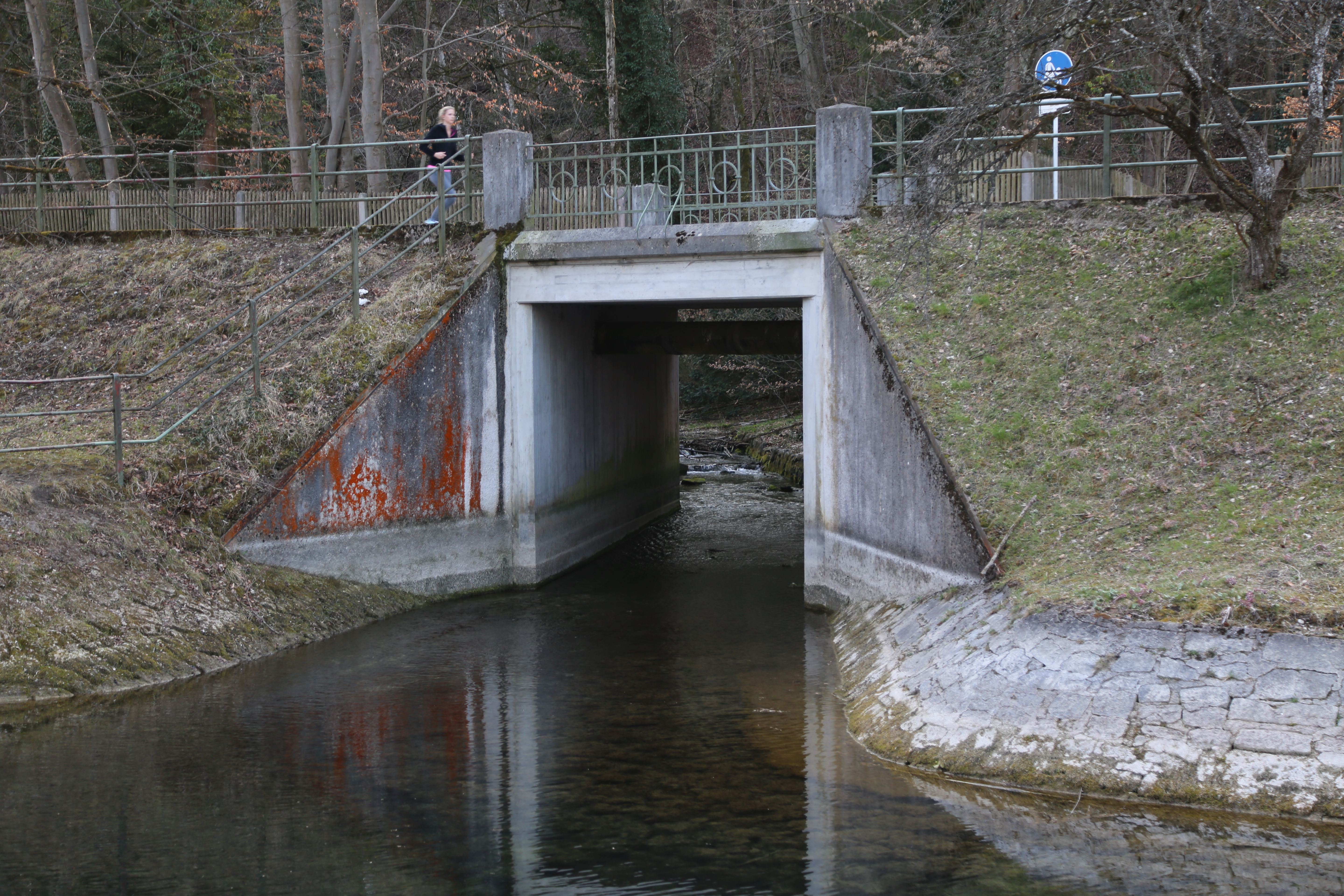 Mündung des Wenzbachs in den Floßkanal, München-Thalkirchen